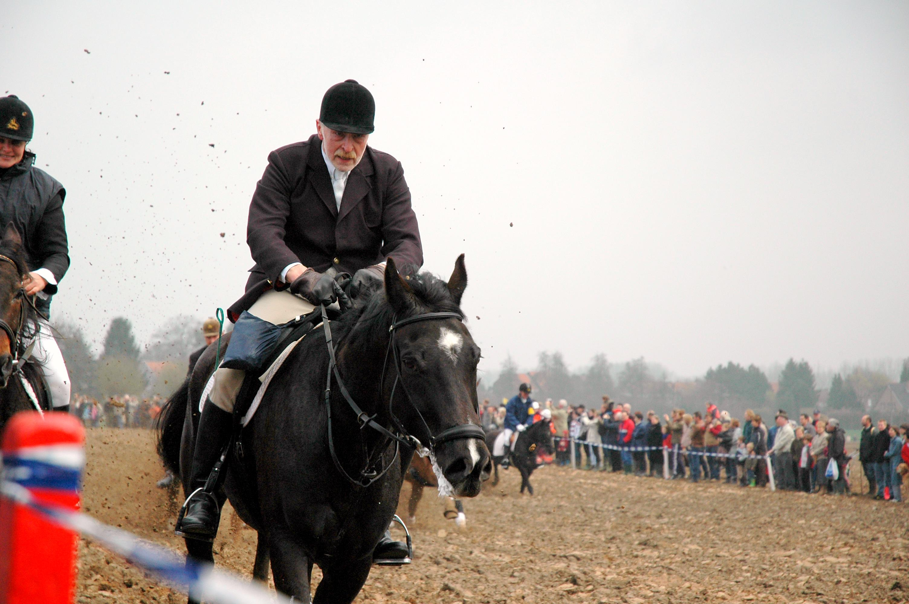 Een paard aan het werk in de paardenprocessie van Hakendover op paasmaandag. Een evenement sinds 691